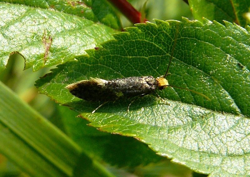 Monopis weaverella. Location: The Netherlands - Ooltgensplaat - Polder het Oude Land